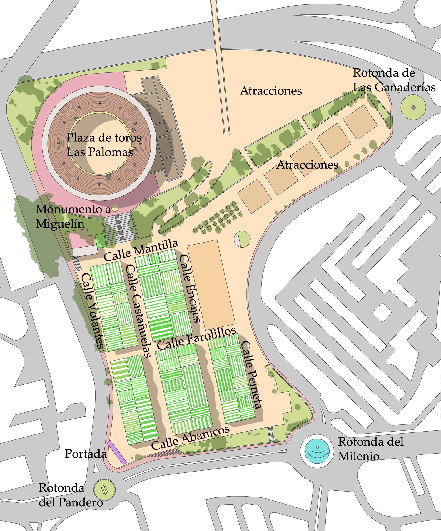 Plano del recinto ferial de Algeciras, Andalucía, España